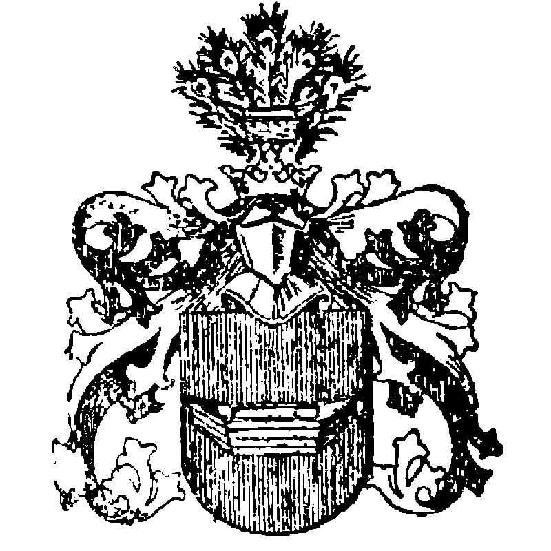 Polish clan Łodzia